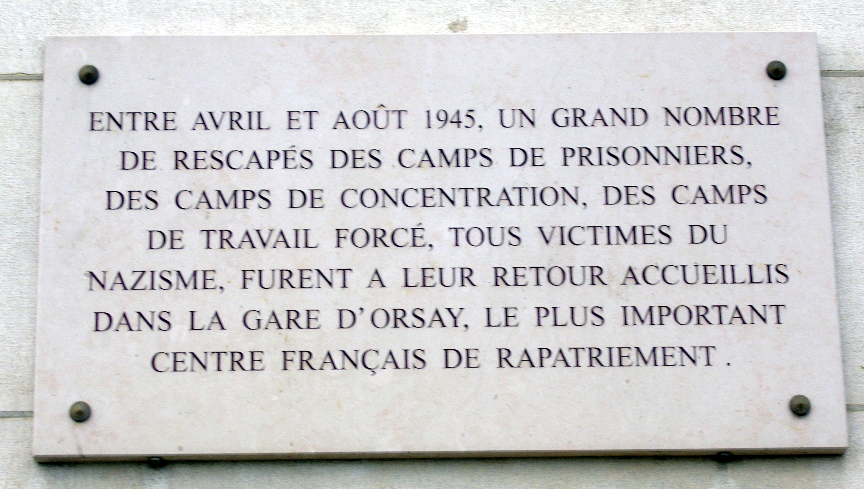 Μουσείο Ορσέ: Αναμνηστική πλάκα επαναπατρισμού κρατουμένων από τη Ναζιστική Γερμανία